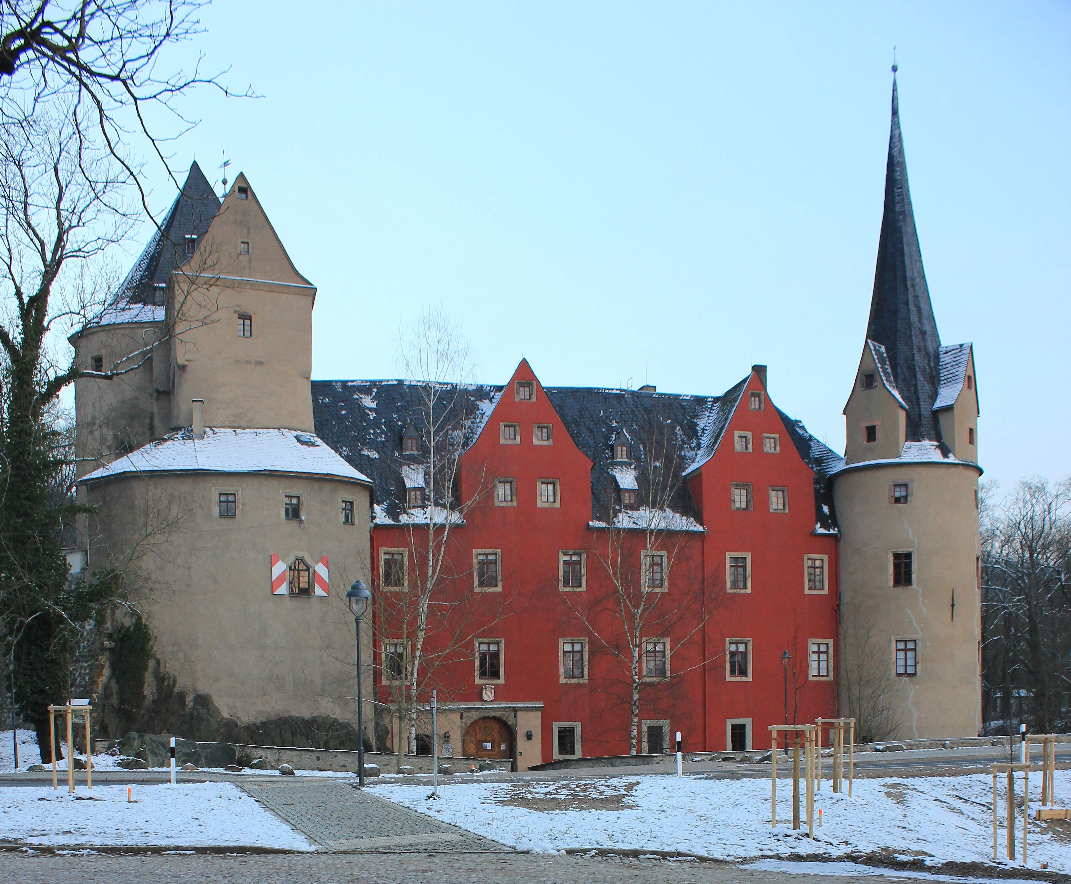 Sachsen, Erzgebirge, Hartenstein, Burg Stein.